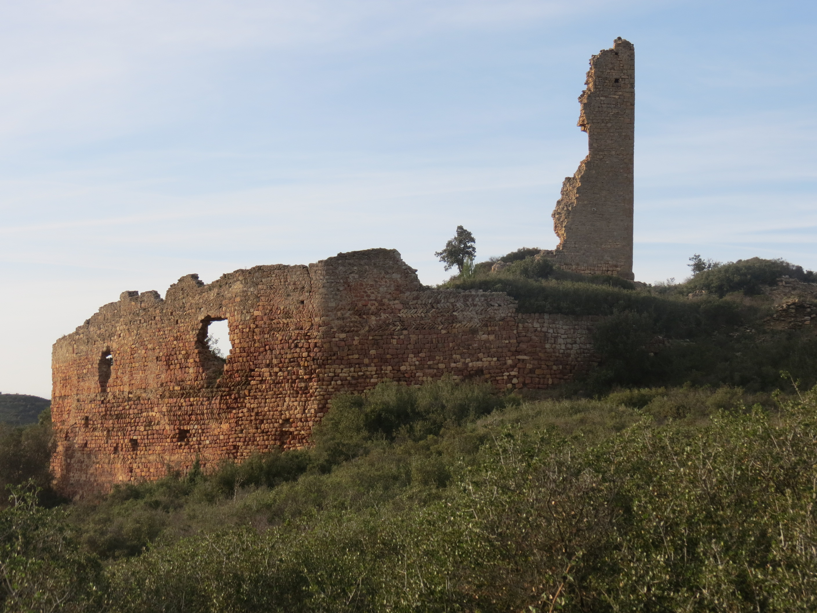 Château de Saint-Pierre-des-Clars, Montredon-des-Corbières, Aude, Languedoc-Roussillon, France.